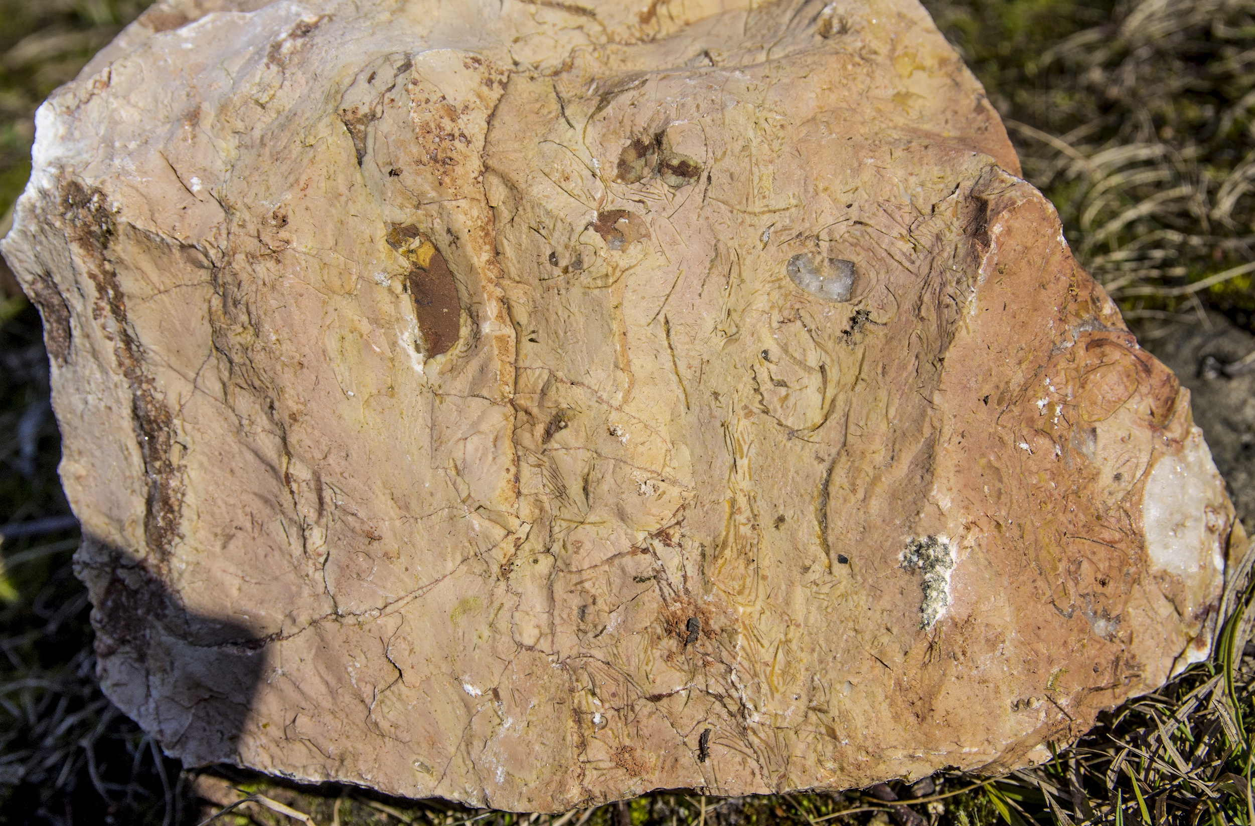 Rogożnicka Skała ze skamieniałościami